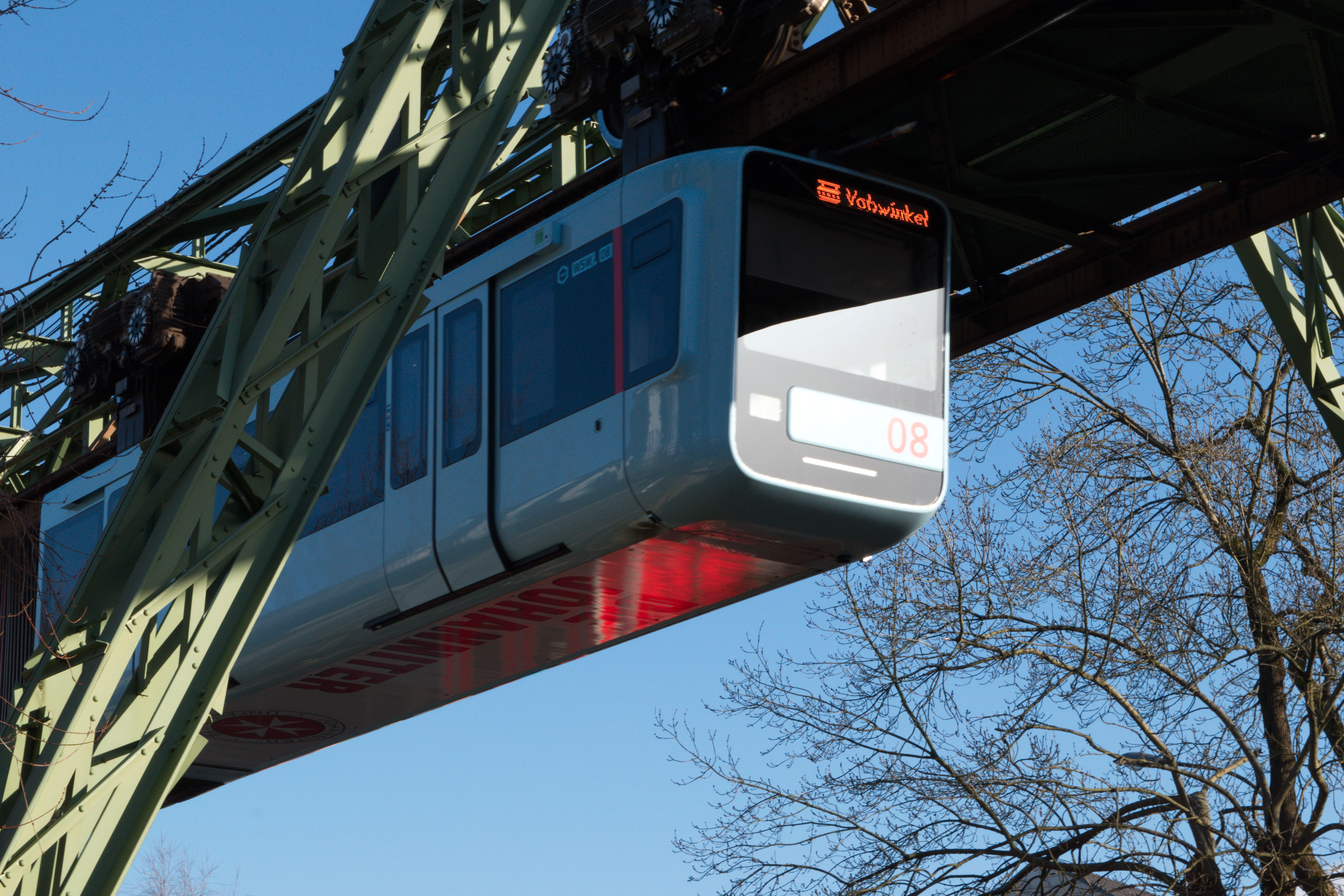 Matagalpa-Ufer, Wuppertal